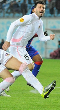 Cesare Bovo, player of Unione Sportiva Città di Palermo